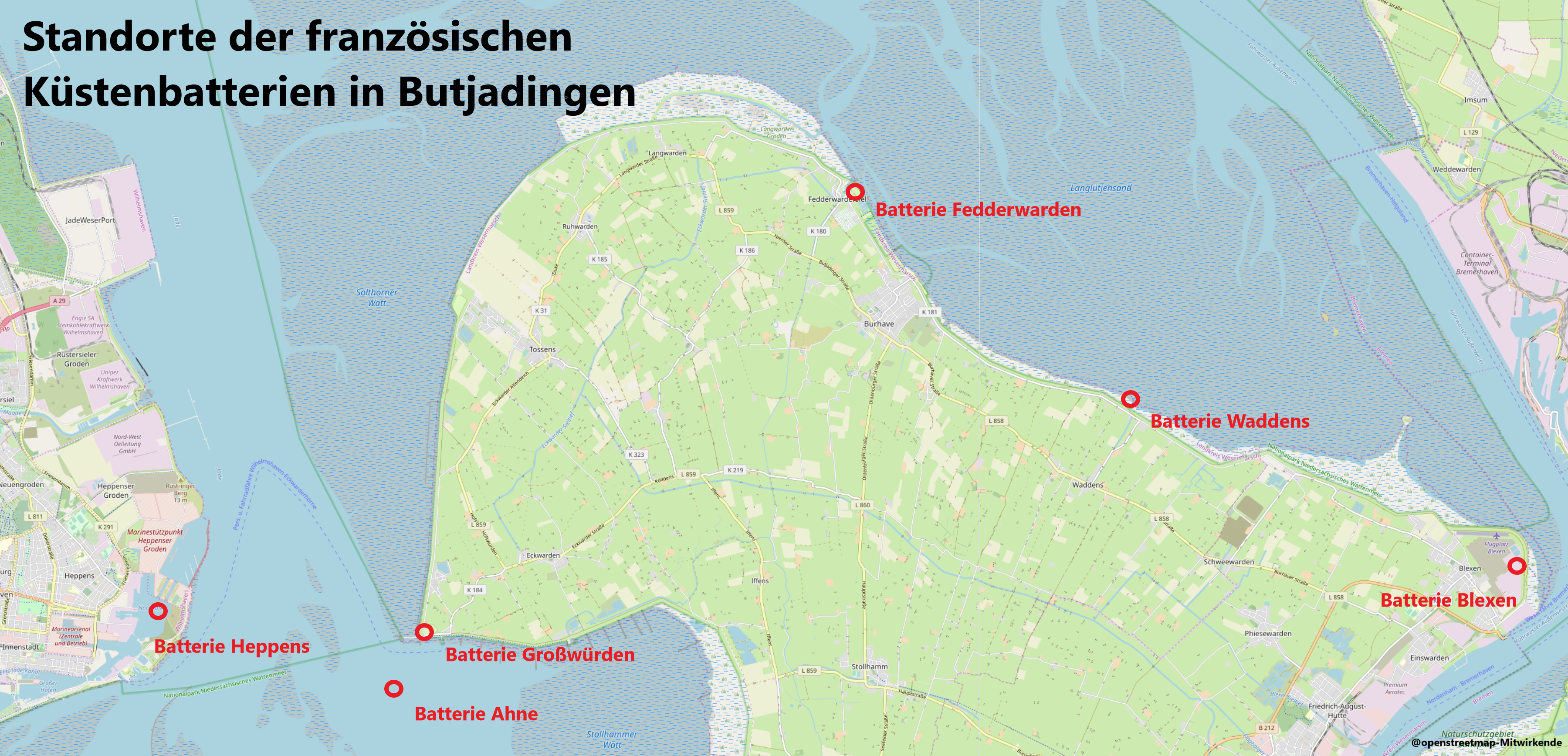 Standorte der französischen Küstenbatterien in Butjadingen